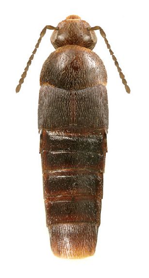 Deinopsis canadensis